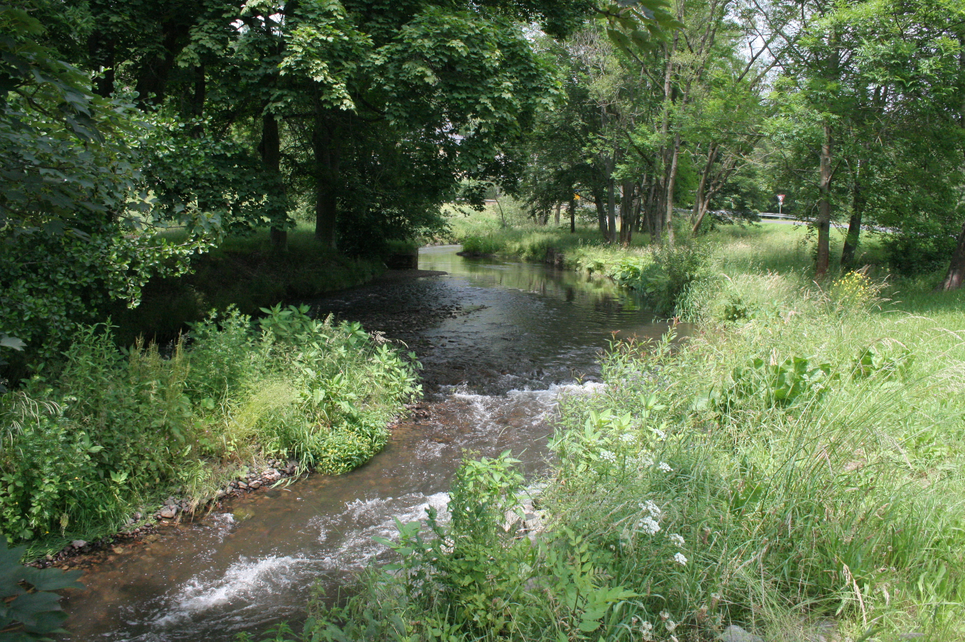 Fluss Hasel (Werra) in Dillstädt